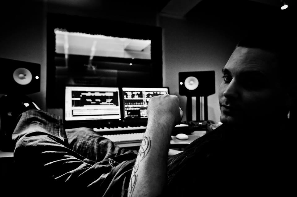 Musikproduzent aus Köln